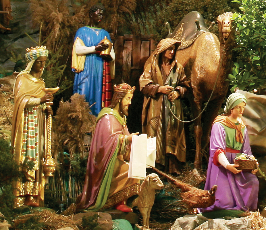 Crib in Katowice Panewniki, Poland (2009)